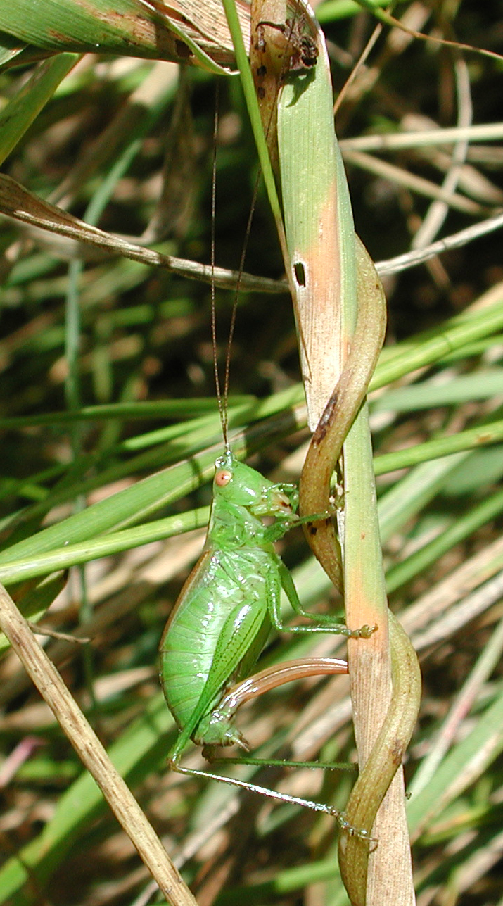 Conocephalus dorsalis, f., Kurzflügelige Schwertschrecke bei der Eiablage, NSG Kirchwerder Wiesen, Elbmarsch bei Hamburg, Deutschland